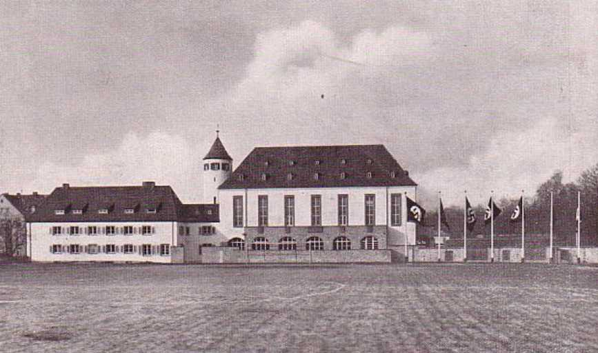 HJ-Heim mit Jugendherberge in Aschaffenburg, Bayern; erbaut 1934-1935 nach Entwurf des Architekten Otto Leitolf; heute genutzt durch die Städtische Musikschule Aschaffenburg